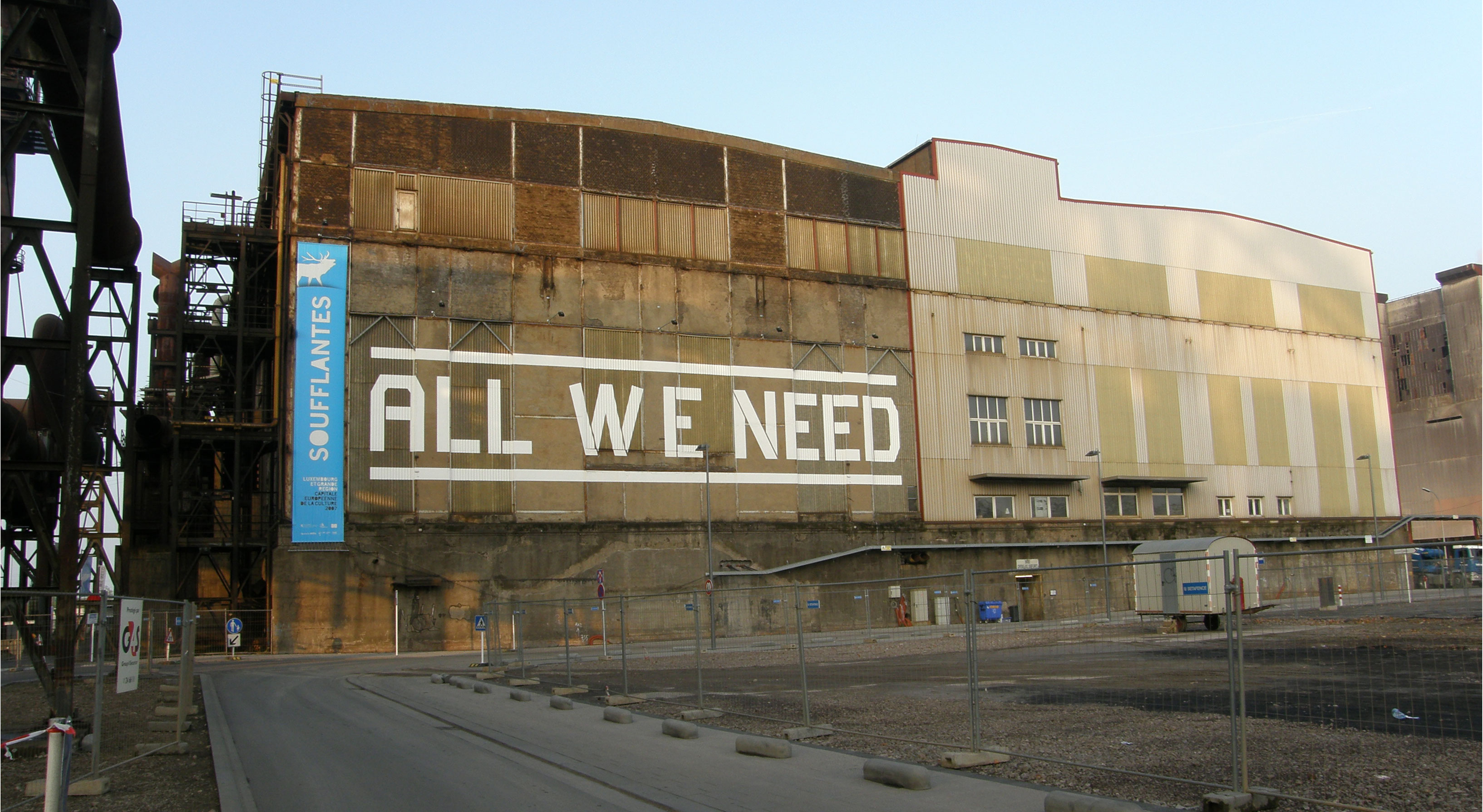 Gebléishal Belval.